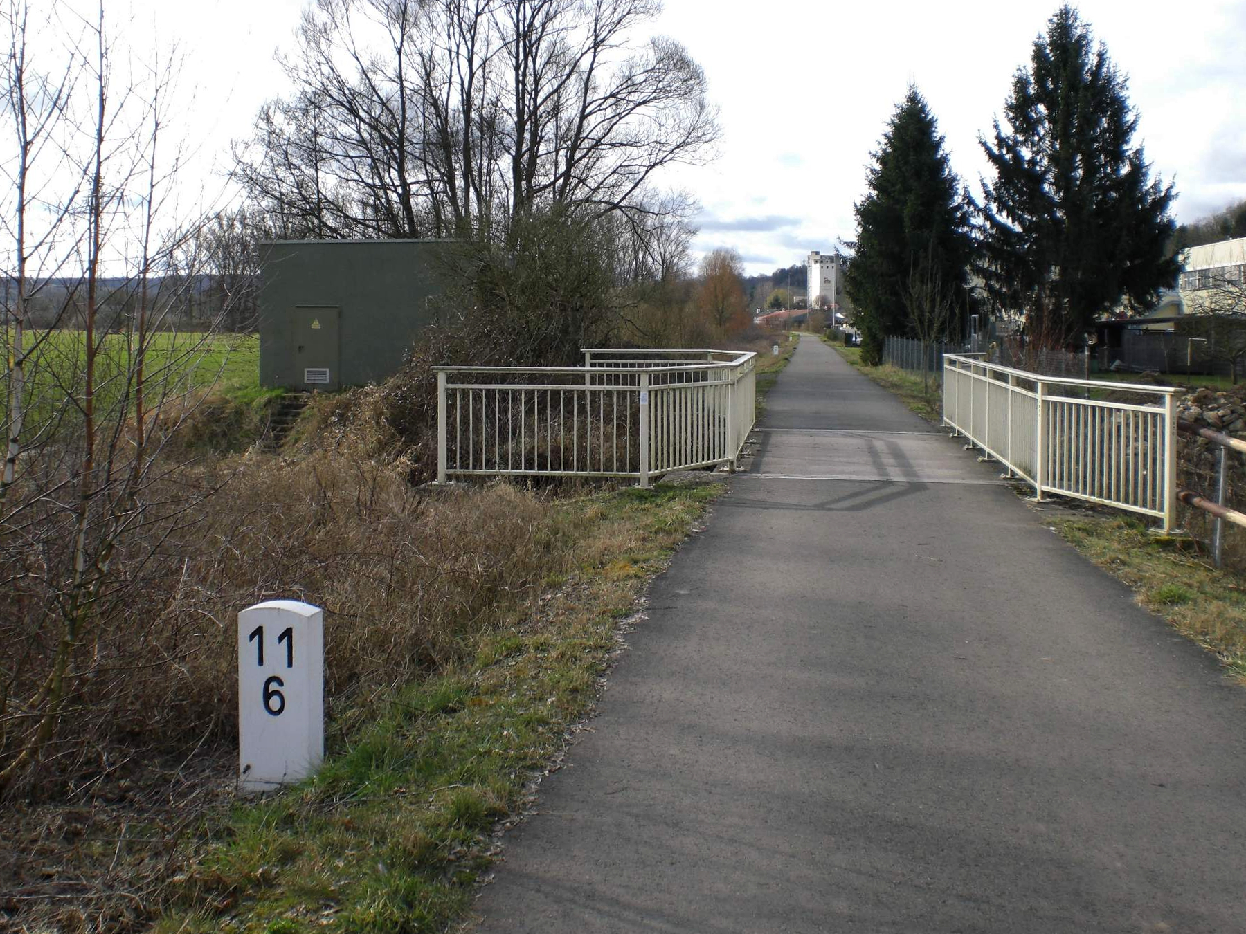 Radweg auf der ehemaligen Bliestalbahn, im Hintergrund Blieskastel